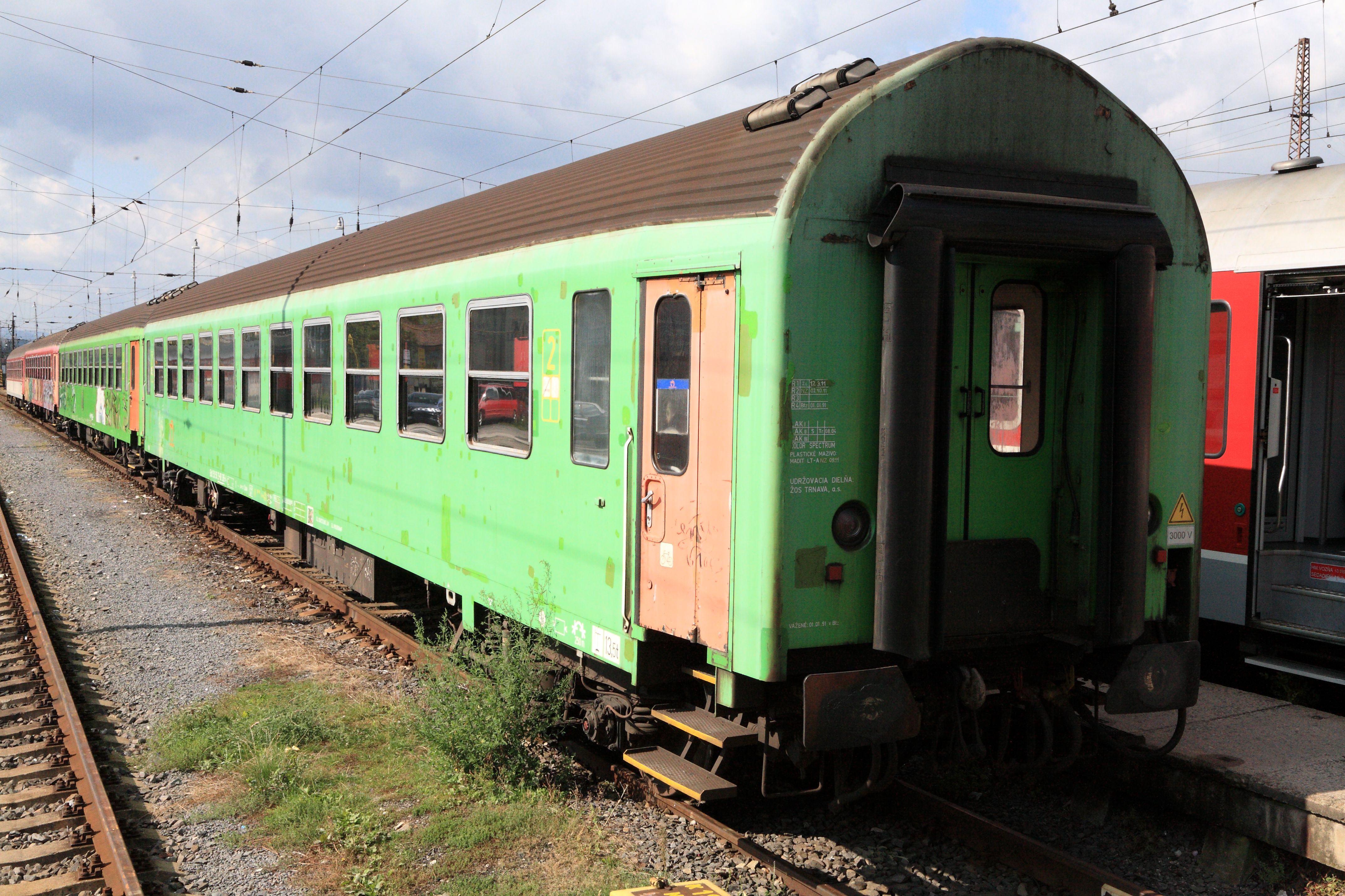 Großraumwagen nach Typ Y, an der abweichenden Form der Fenster und dem gesickten Dach von den Bautzener Wagen zu unterscheiden.